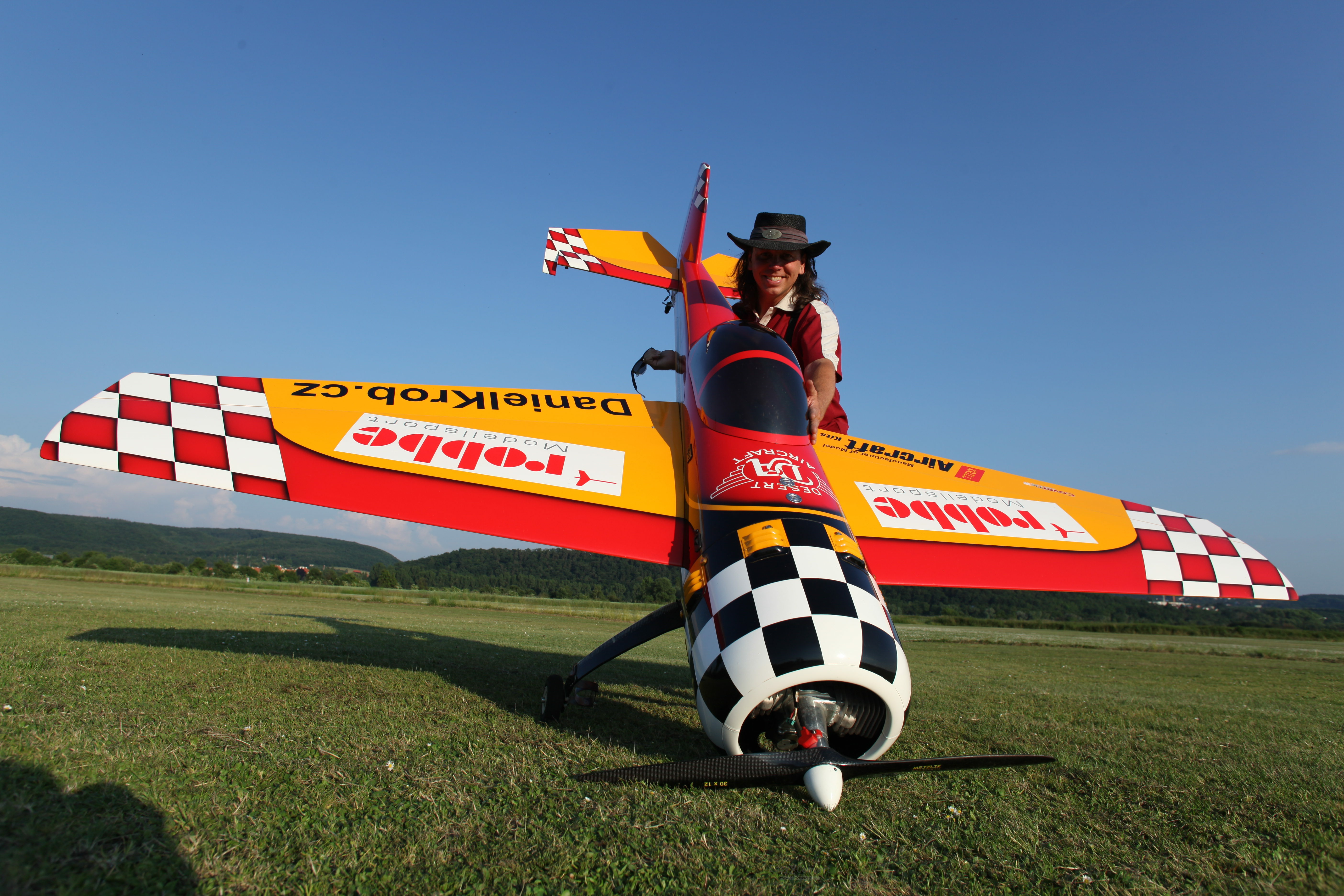 Yak 55